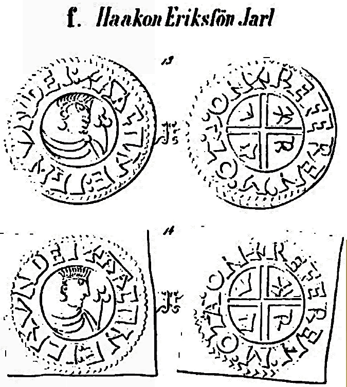 Mynt fra regjeringstiden til Håkon Eiriksson Ladejarl, som identifisert av C.I.Schive (1865) Advers tolket til: AACUNE IGNUNDEI (in nomine dei) Revers tolket til: REFEREN MONETARIUS